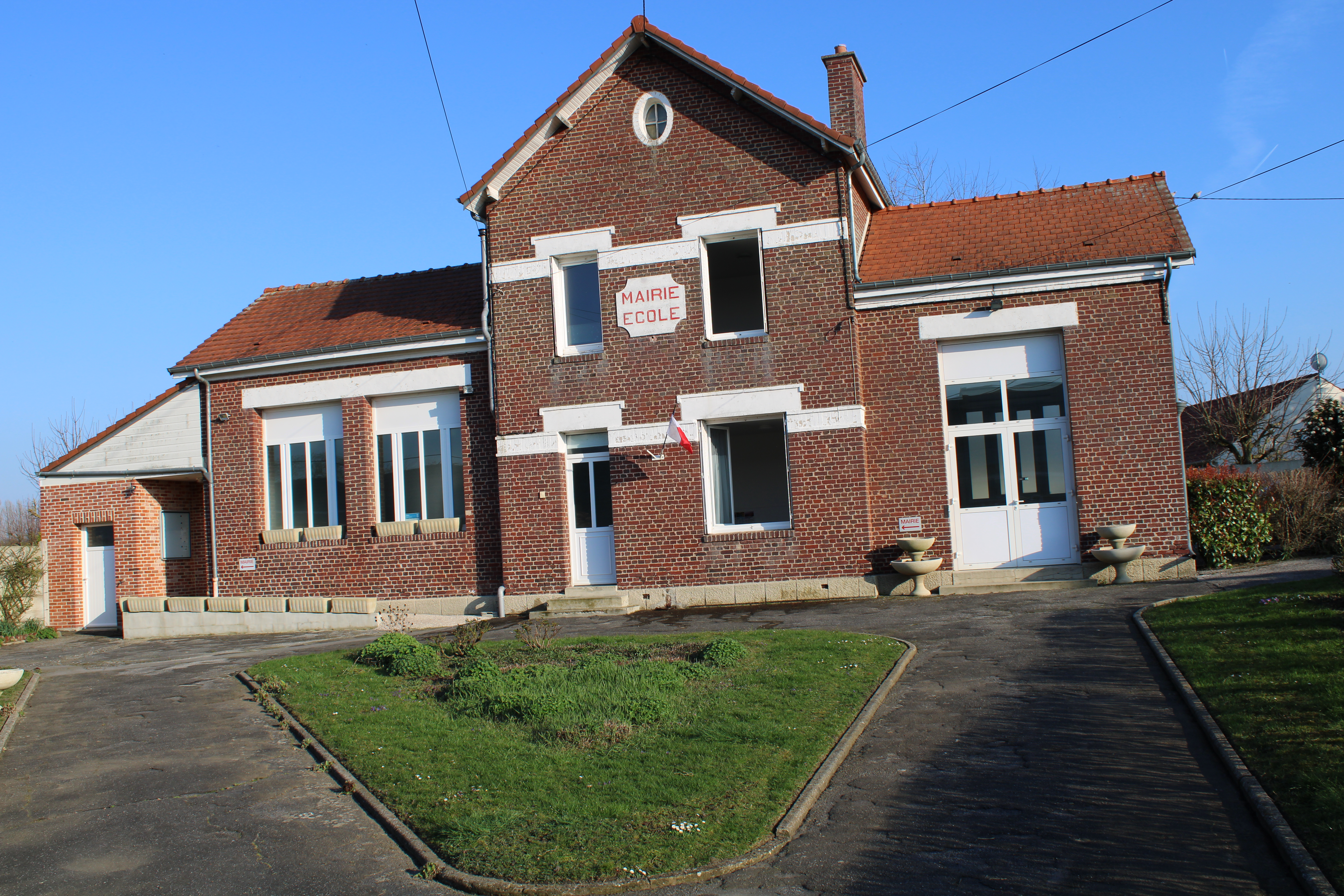 La mairie